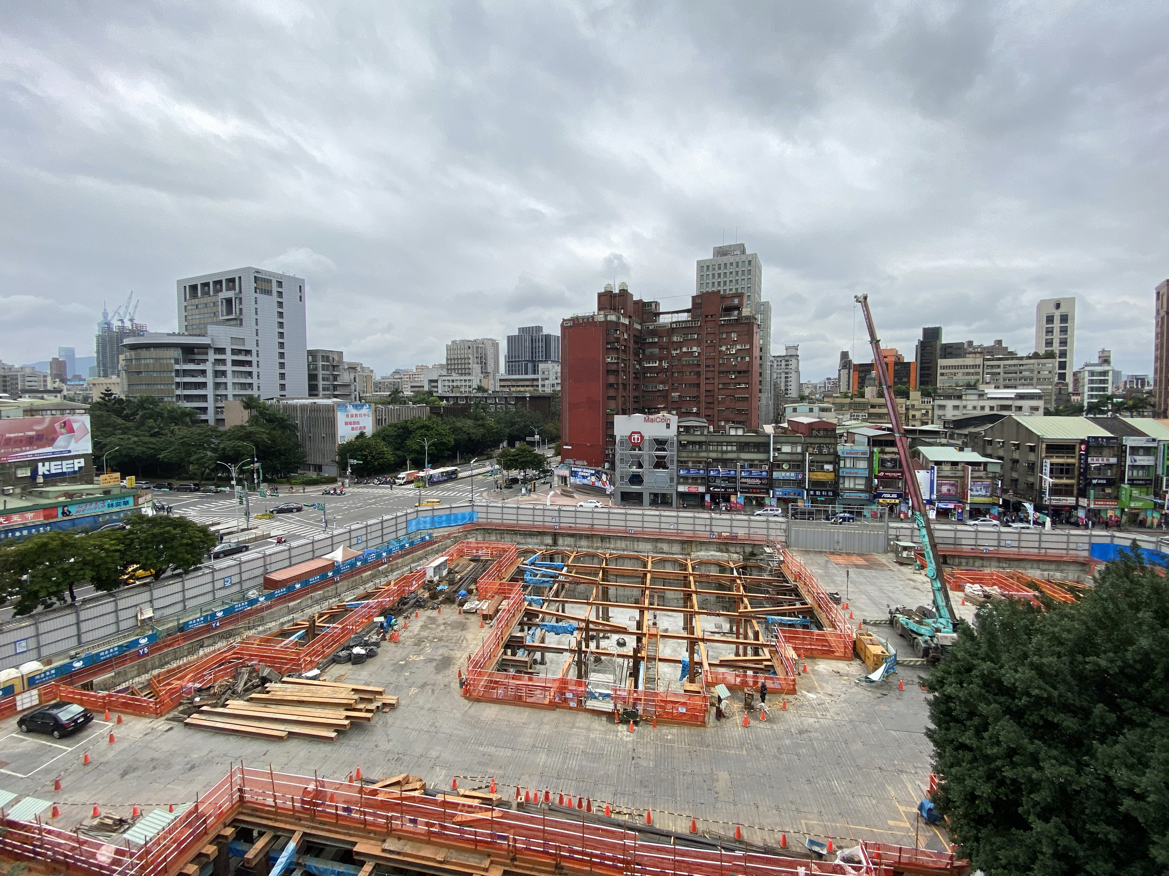 八德路一段 site